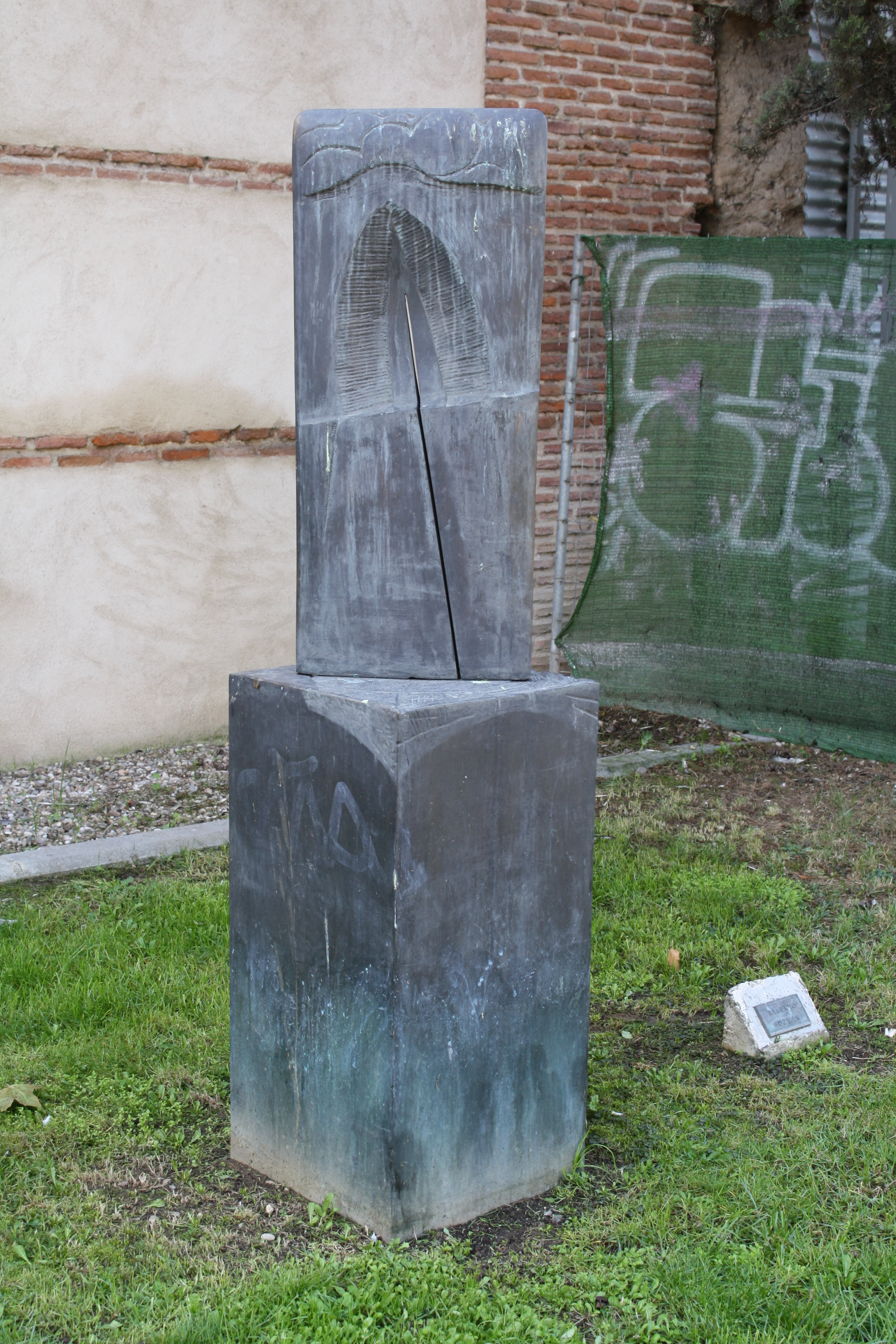 Museo de Escultura al Aire Libre de Alcalá de Henares (Comunidad de Madrid - España). Escultor: Alberto Guzmán.